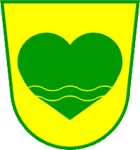 Wappen von Zreče Slowenien